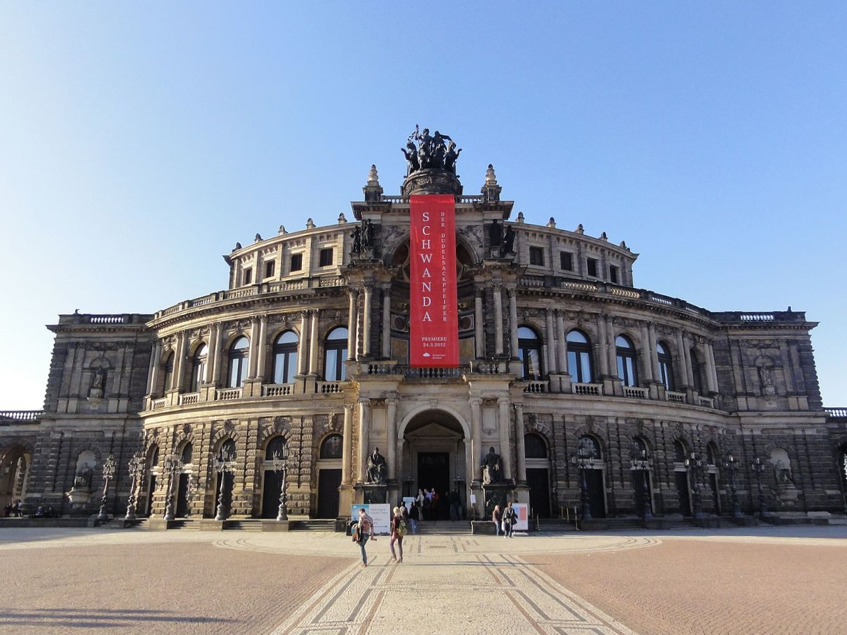 Semper Oper